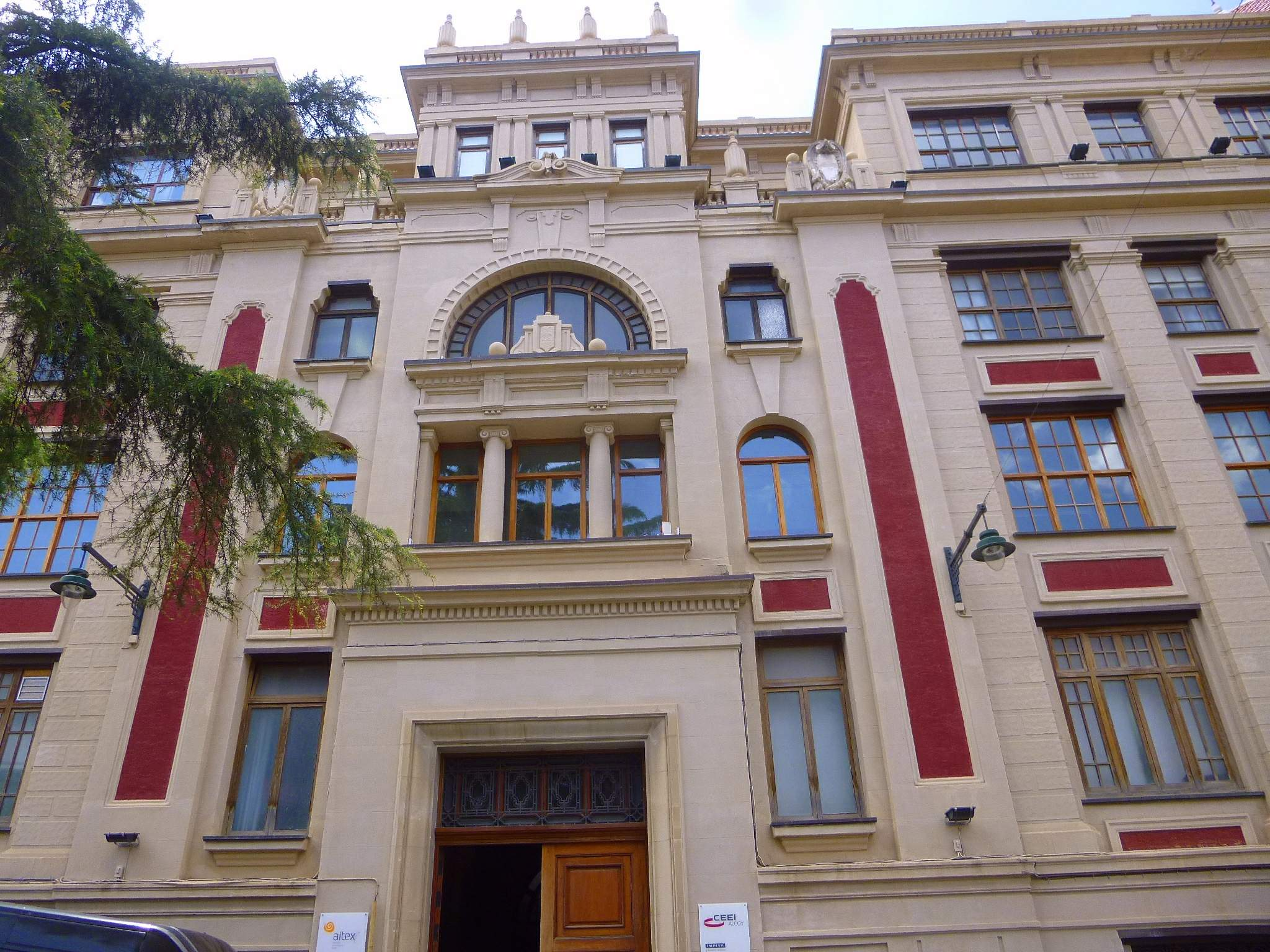 Alcoy - Centro Europeo de Empresas e Innovación (CEEI)